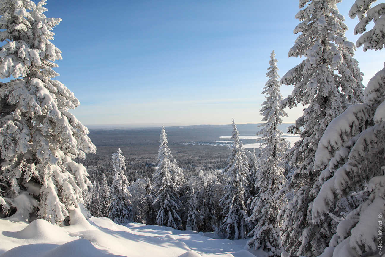 Zuratkul National Park